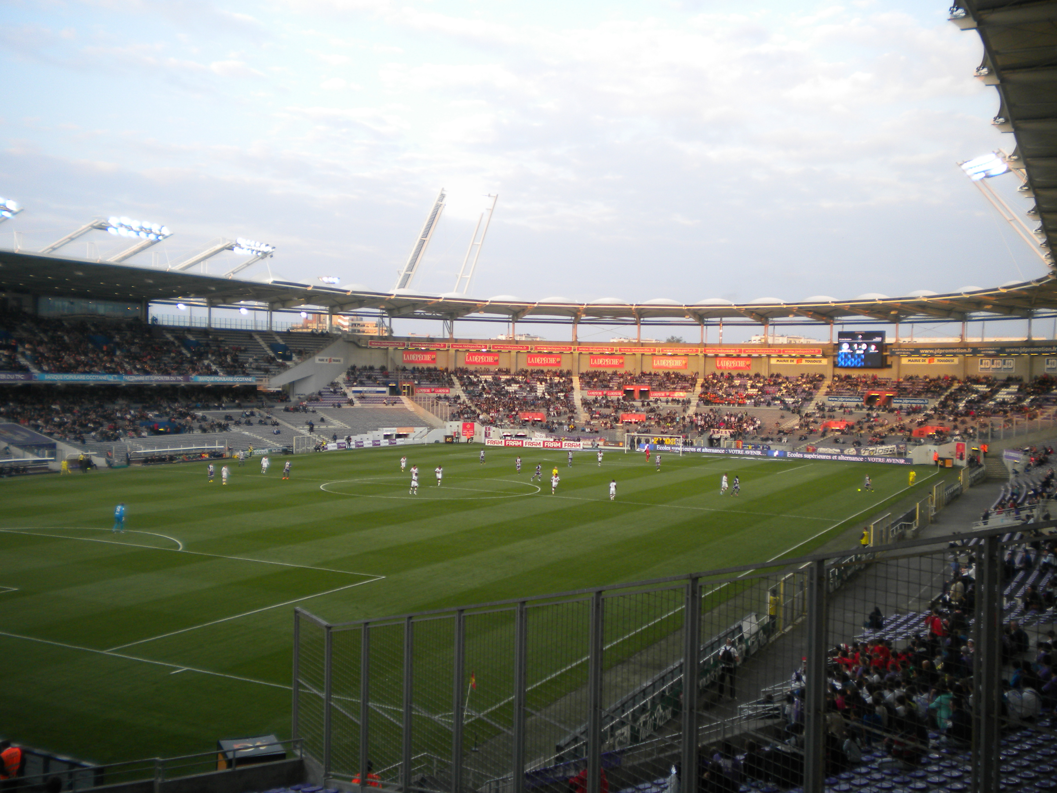 Le Stadium lors du match de Ligue 1 entre le Toulouse FC et le LOSC Lille du 5 mai 2013.